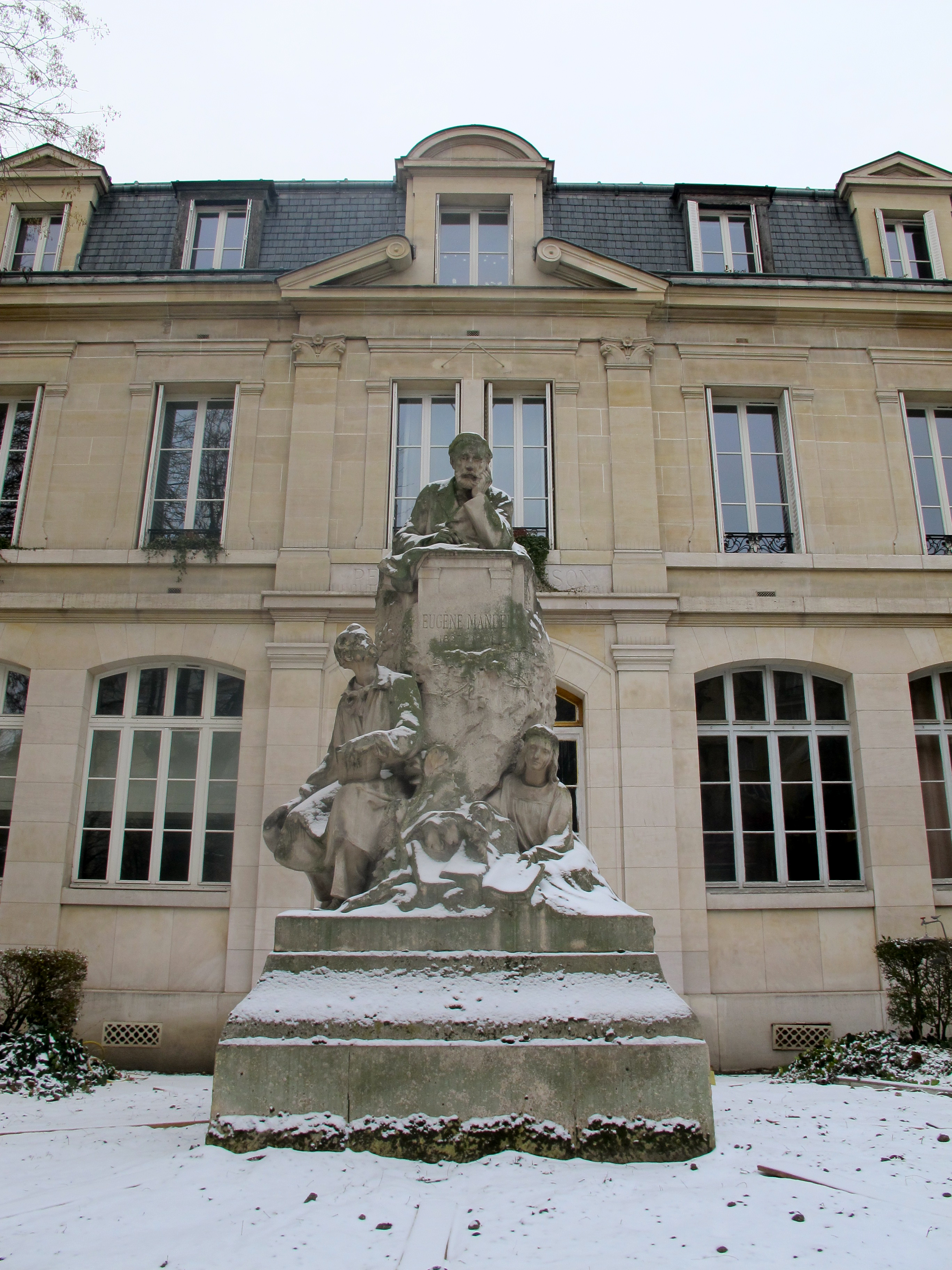 Monument à Eugène Manuel (1823-1901) par Gustave Michel (1881-1924), inauguré le 5 juillet 1908 dans la cour du « petit lycée » Janson-de-Sailly, 46 avenue Georges Mandel, Paris 16e.